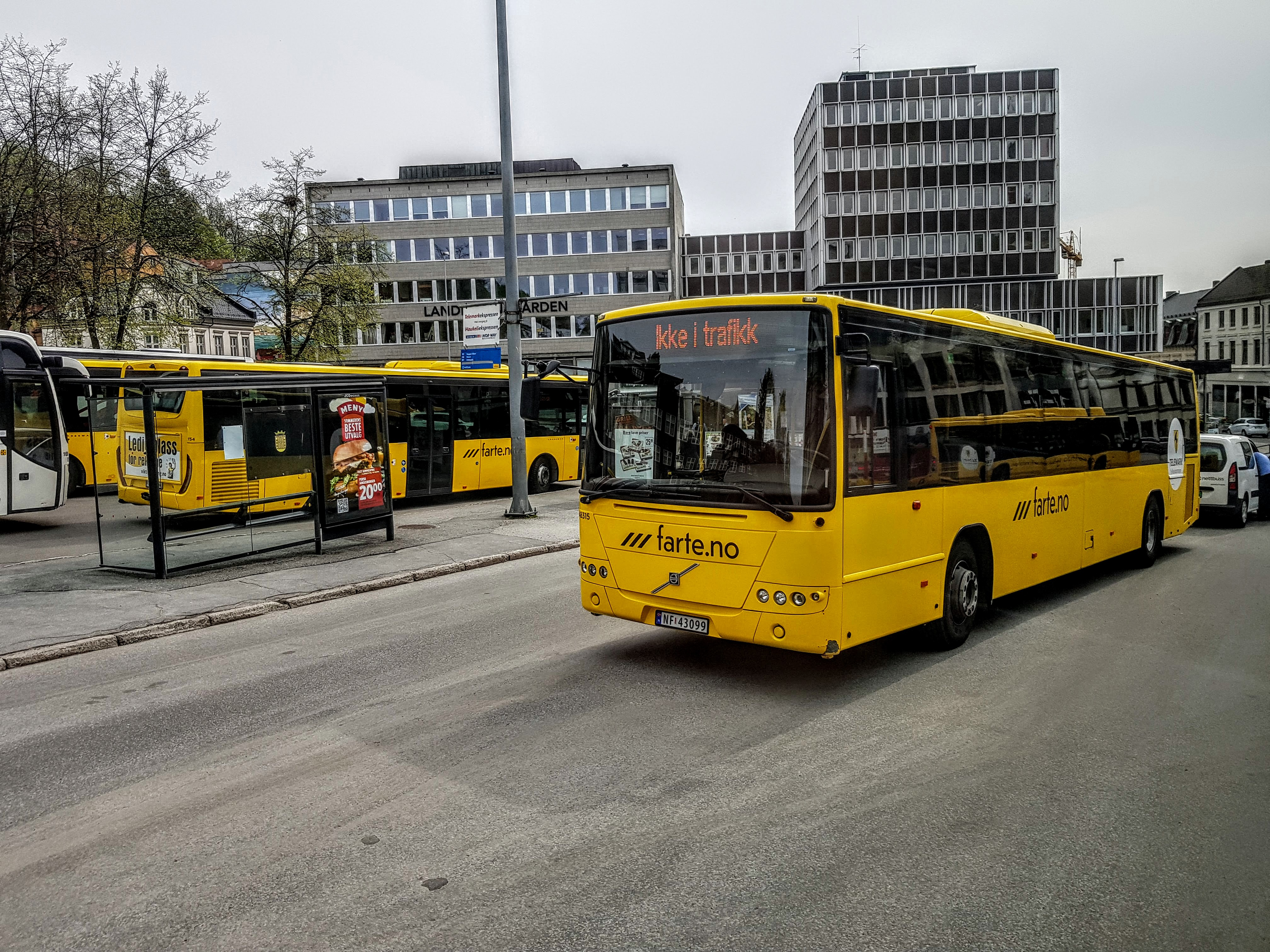 En Volvo 8700 på Skien Terminal Landmannstorget. Disse ble kjøpt inn for skolebusskjøring.